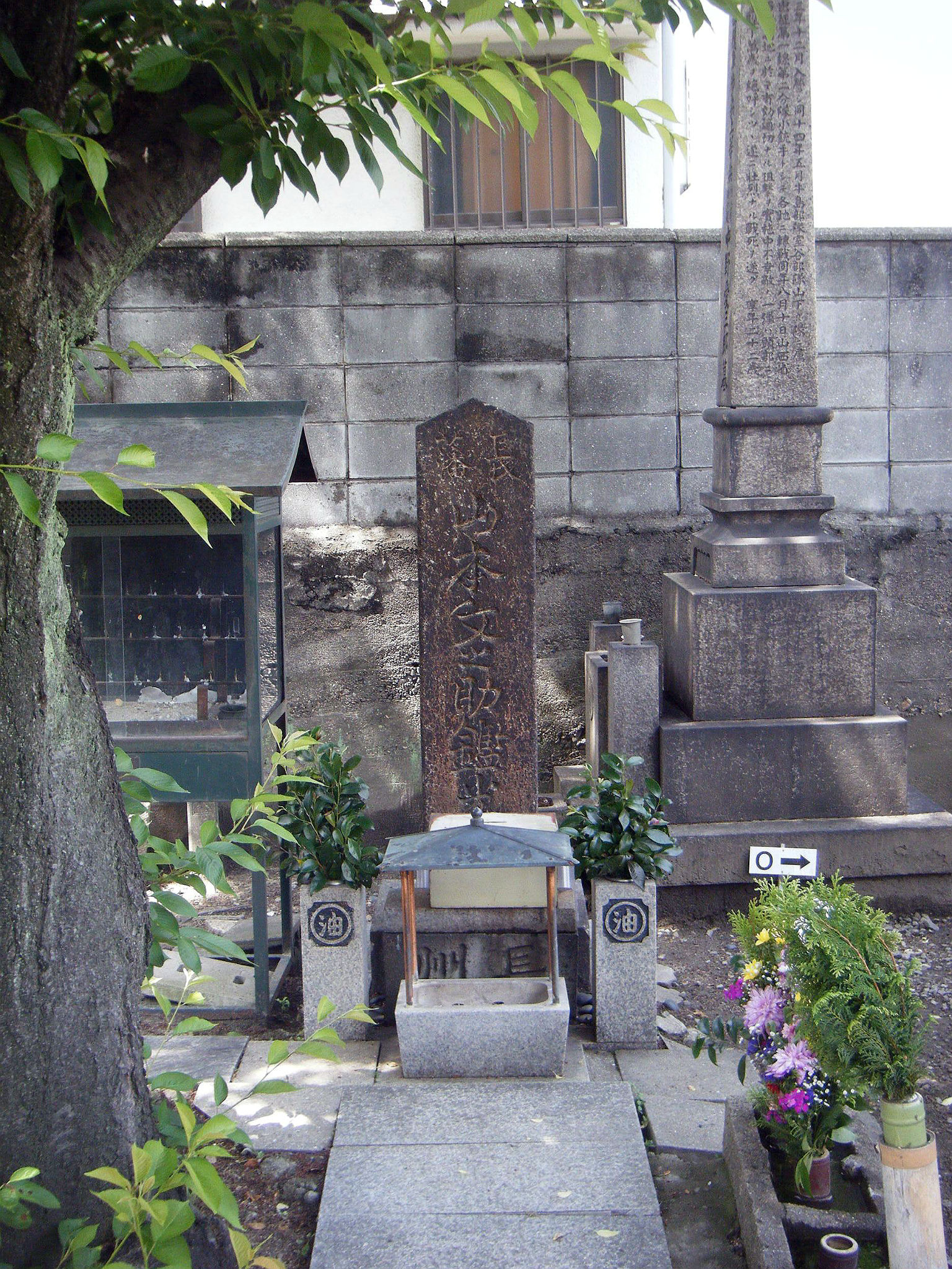 残念さんの墓（長州藩兵・山本文之助の墓） 兵庫県尼崎市